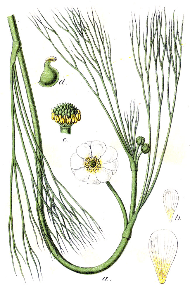 Ranunculus fluitans Lam. Original Caption Fluss-Ranunkel, Ranunculus hybridus fluitans